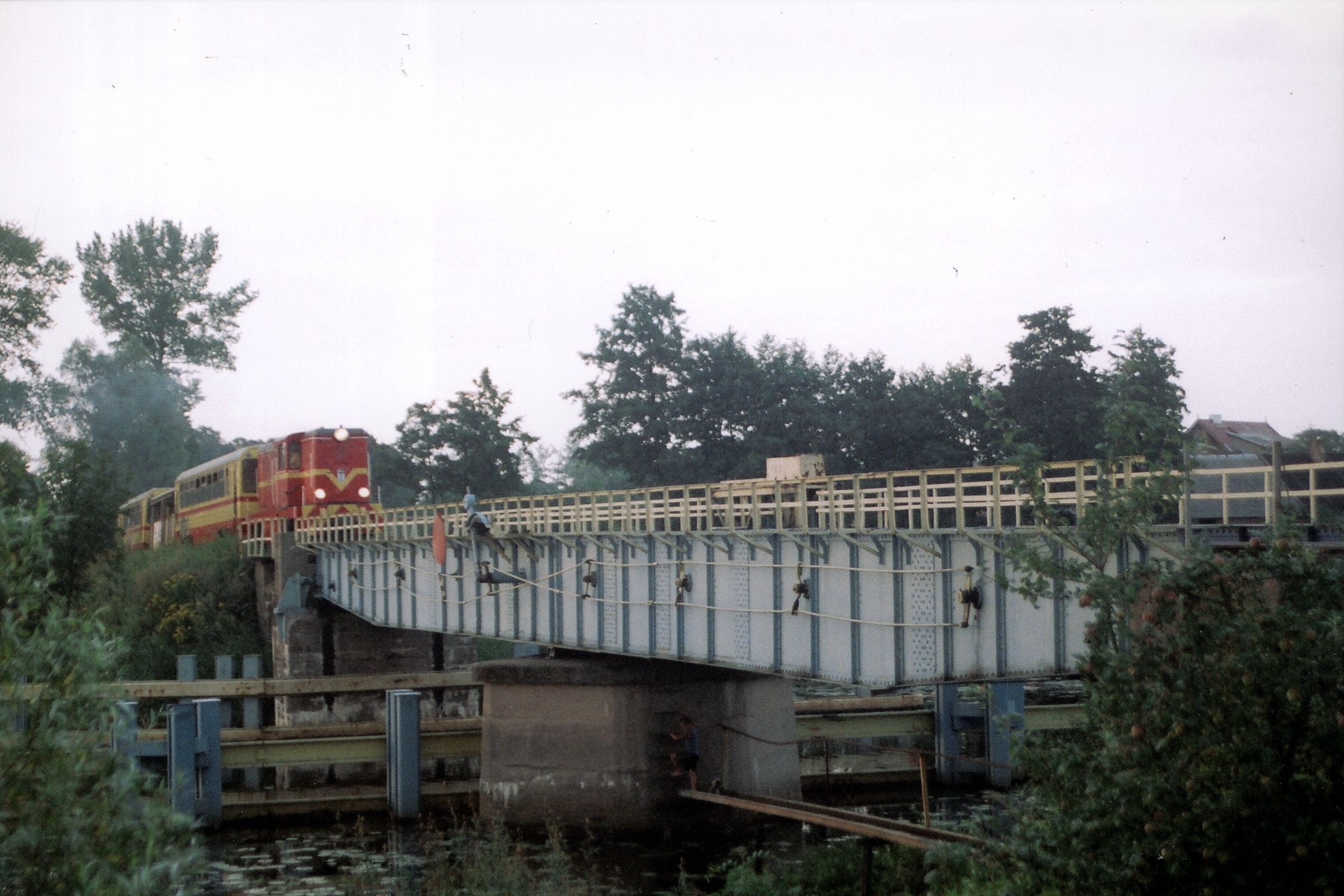 Rybina - most kolejowy obrotowy wąskotorowy nad rz. Szkarpawą, 1935 (Pociąg Żuławskich Kolei Dojazdowych ze Stegny do Nowego Dworu Gdańskiego wjeżdża na most obrotowy)